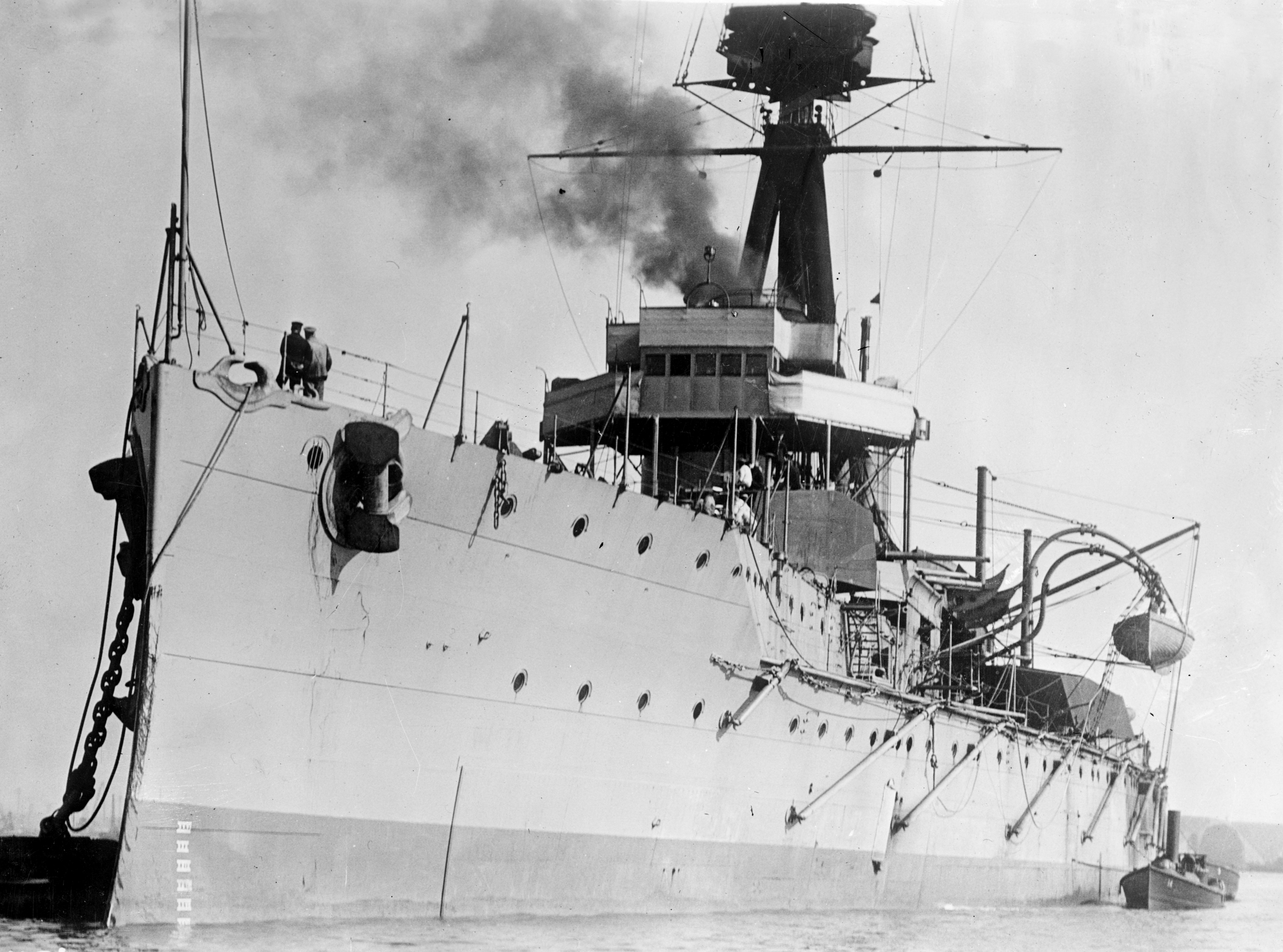 HMS Colossus